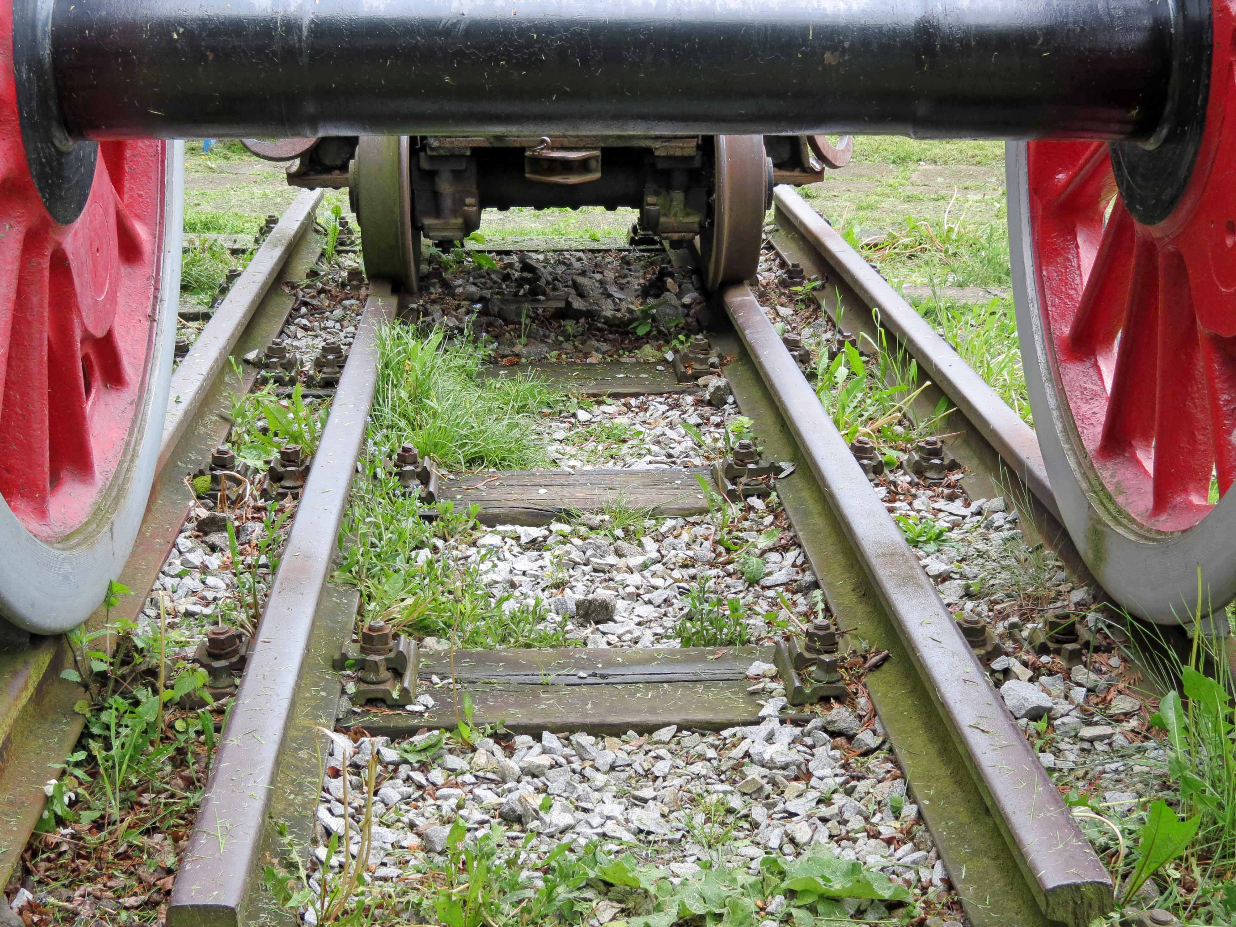 Úzkorozchodná dráha